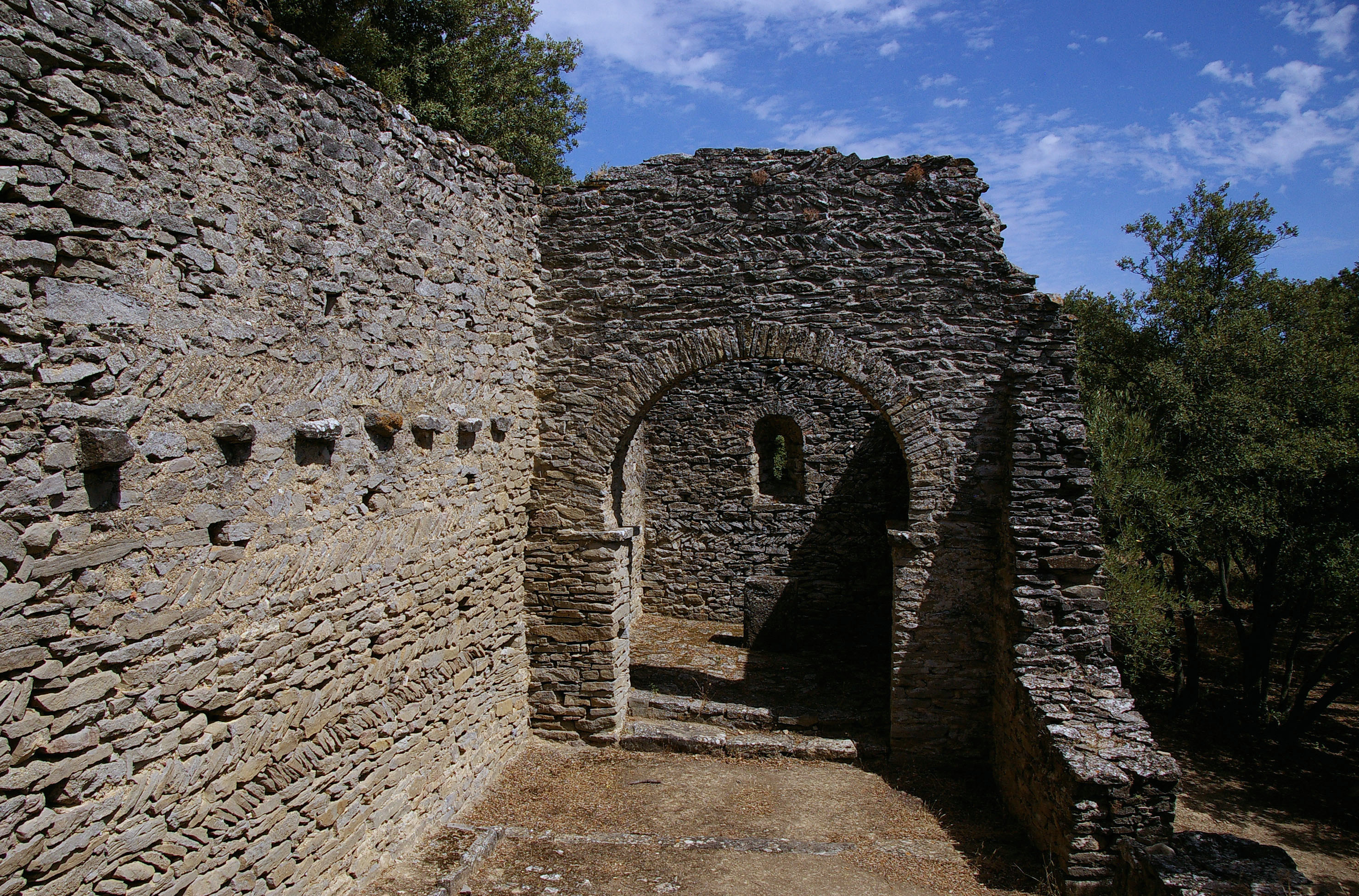 Vestiges de la chapelle préromane "Notre-Dame de la Lauze" située à Villarlong, parcelle cadastrale B97, coordonnées 43.28220 N, 2.48255 E, commune de Villarzel-Cabardès dans l'Aude. Classée MH le 1966/09/30, Référence PA00102917 dans la base Mérimée sous l'intitulé "Chapelle Notre-Dame-de-la-Lauze (vestiges)"